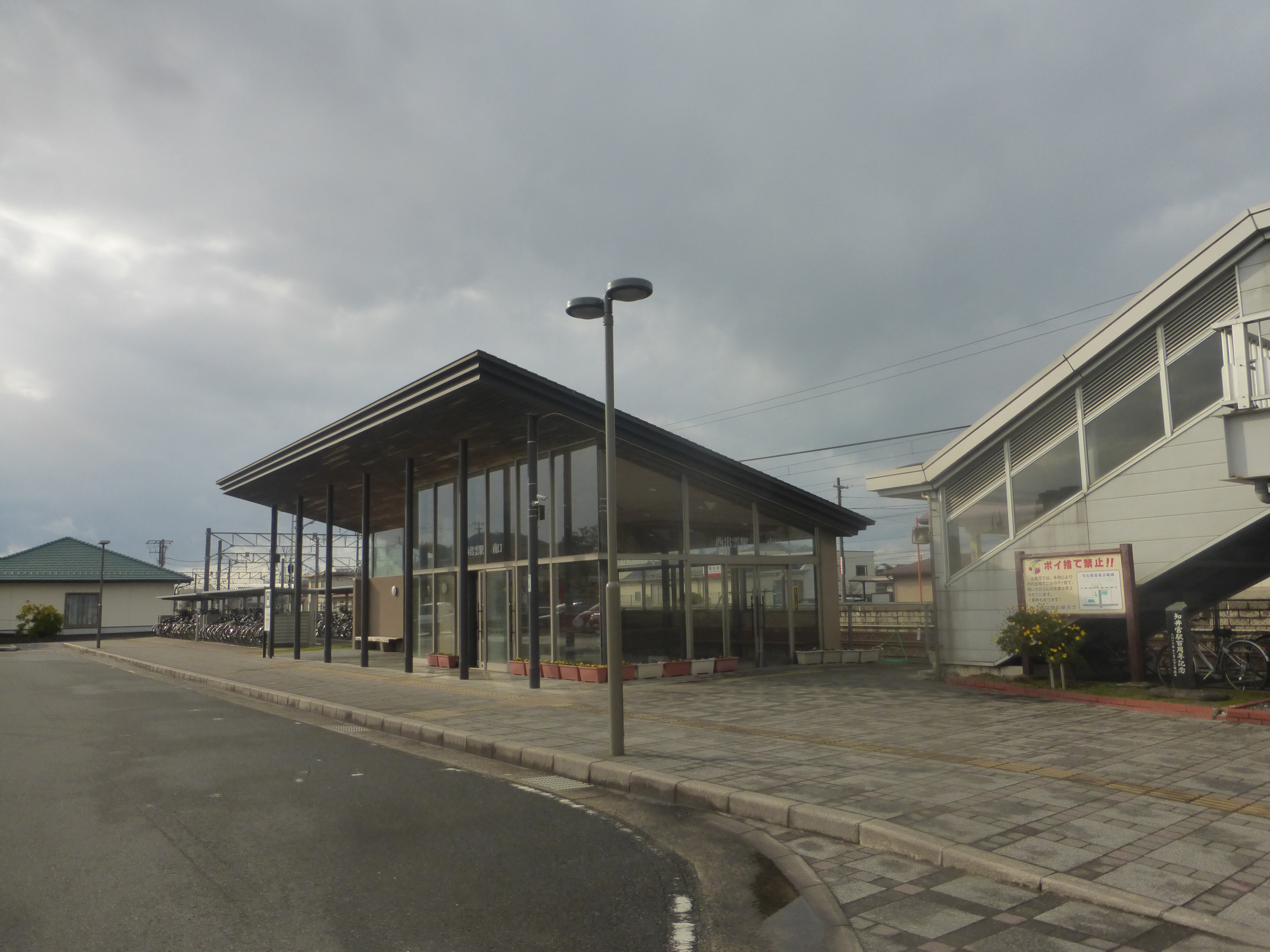 Nishi-Izumo Station (西出雲駅)